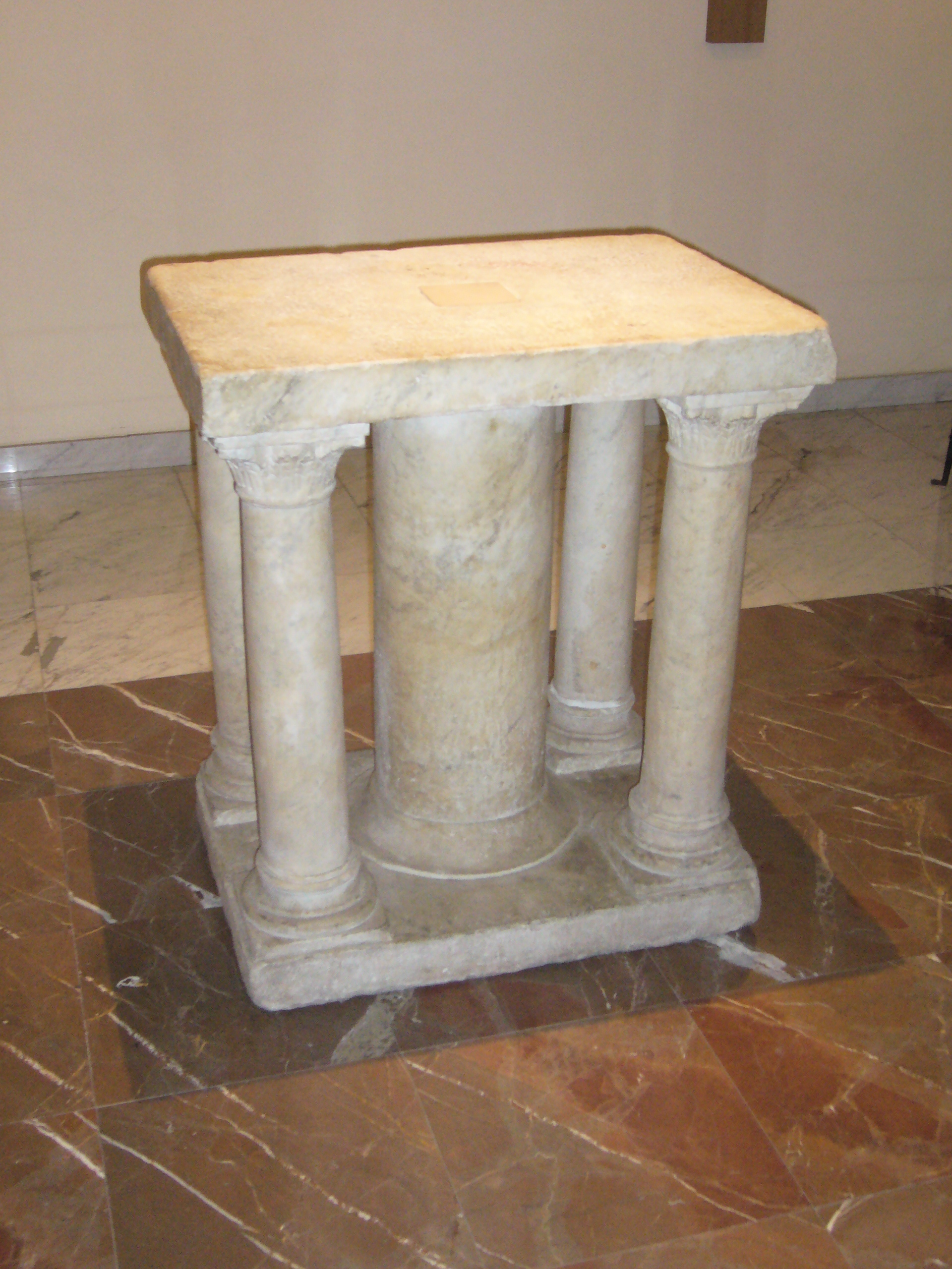 autel de marbre du XIIème siècle provenant de l'ancienne église Saint-Yves-des-Bretons de Rome. Sculpté dans un unique bloc de marbre; Actuellement conservé à Saint-Louis-des-Français à Rome